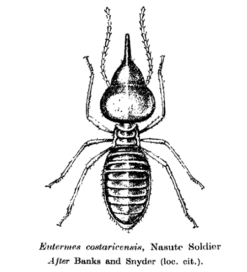 Termite Nasute